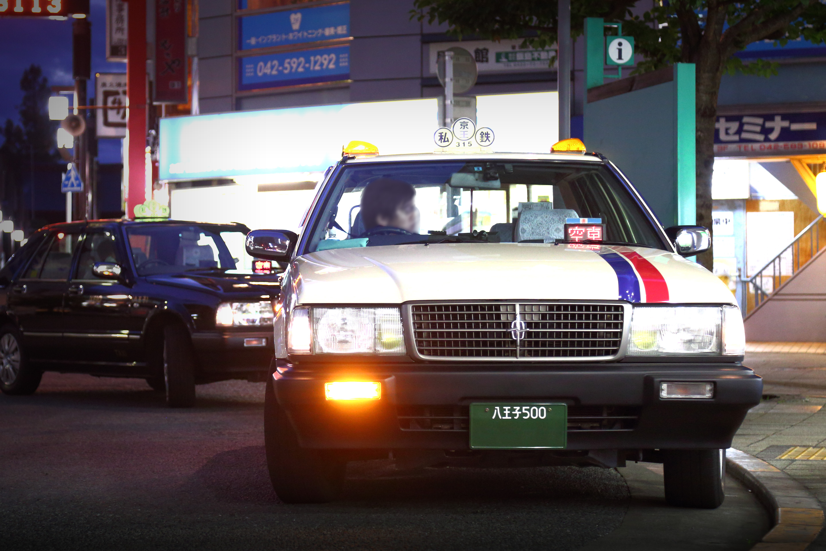 日産・セドリック営業車（京王自動車）の正面画像。 ※ 修正箇所あり。